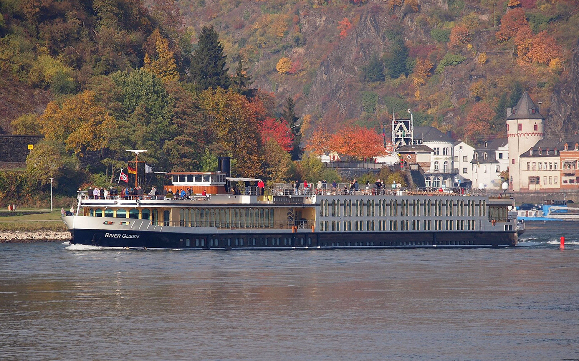 Kabinenfahrgastschiff River Queen bei Sankt Goarshausen kurz vor der Loreley